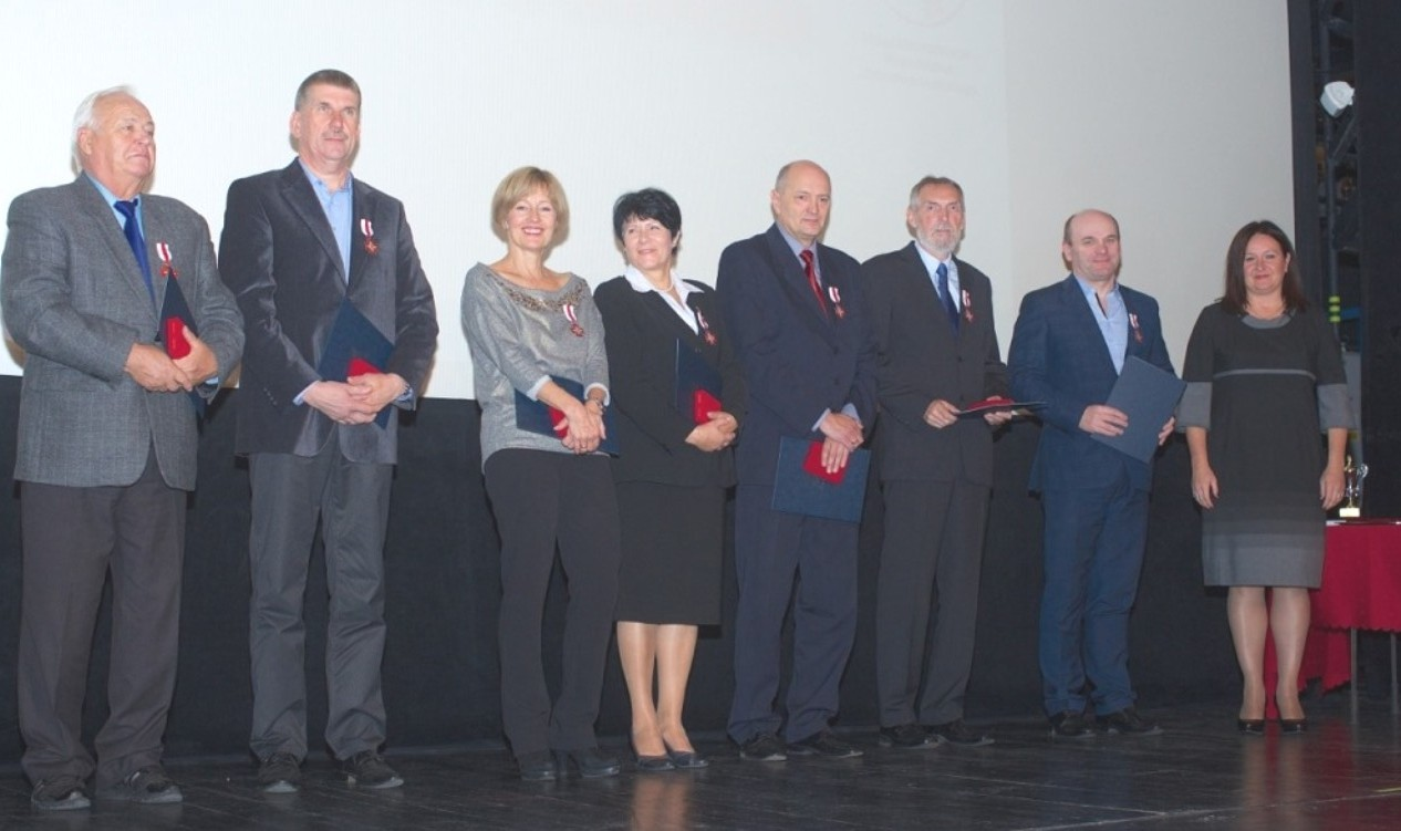 Wyróżnienie - Tadeusz Gutowski